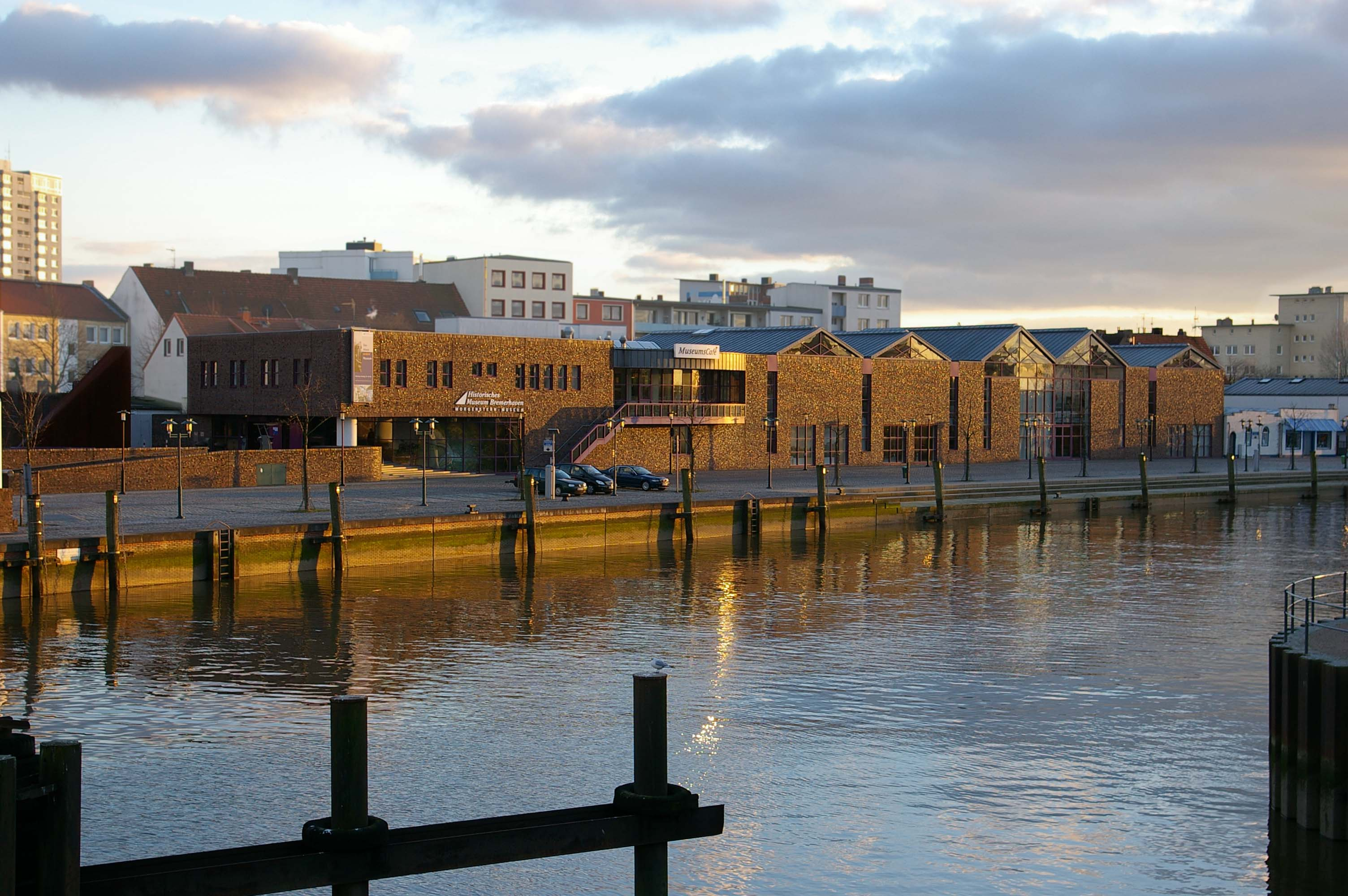 Ansicht des Historischen Museums Bremerhaven